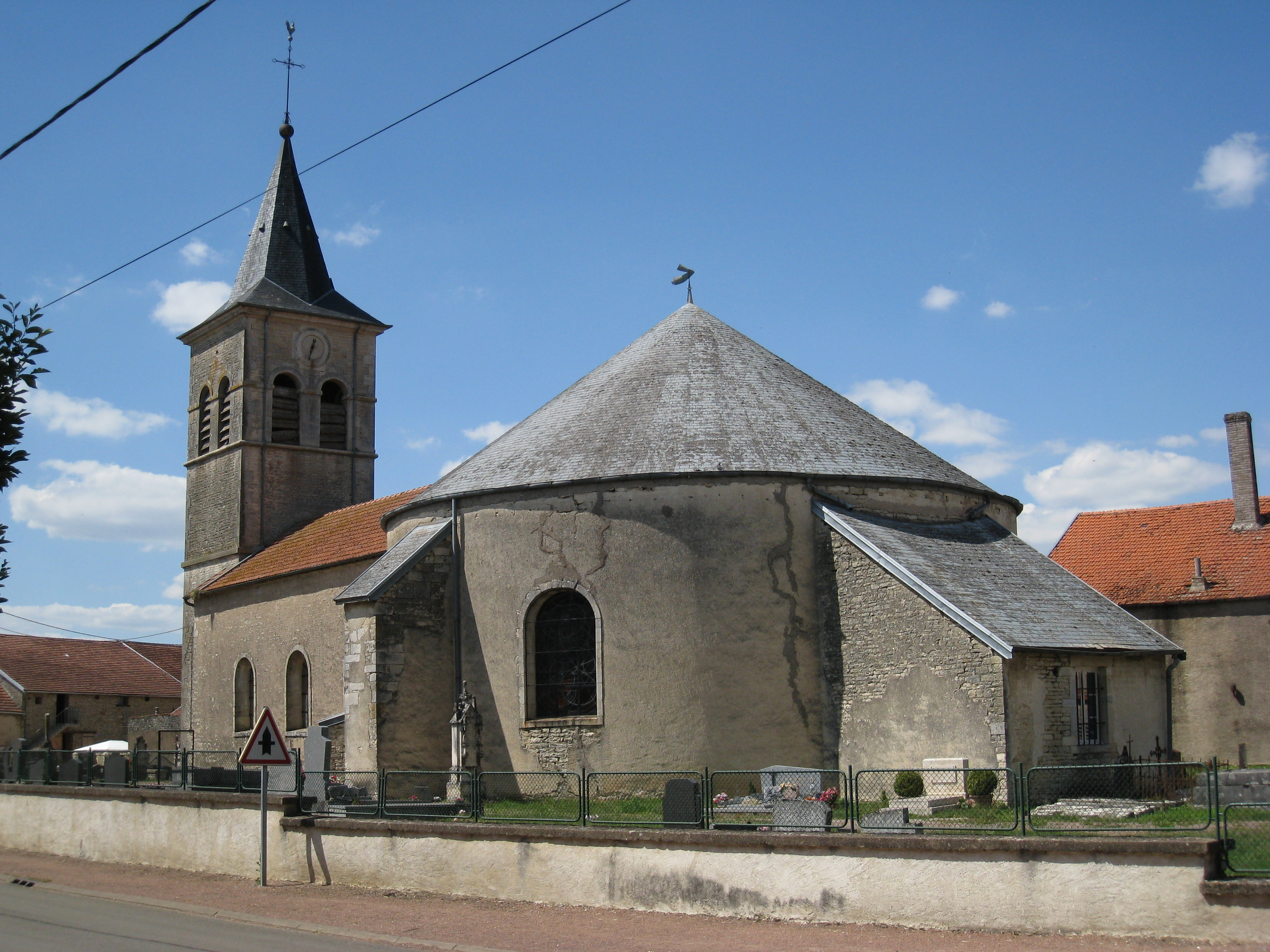 L'église de Cusey avec sa rotonde